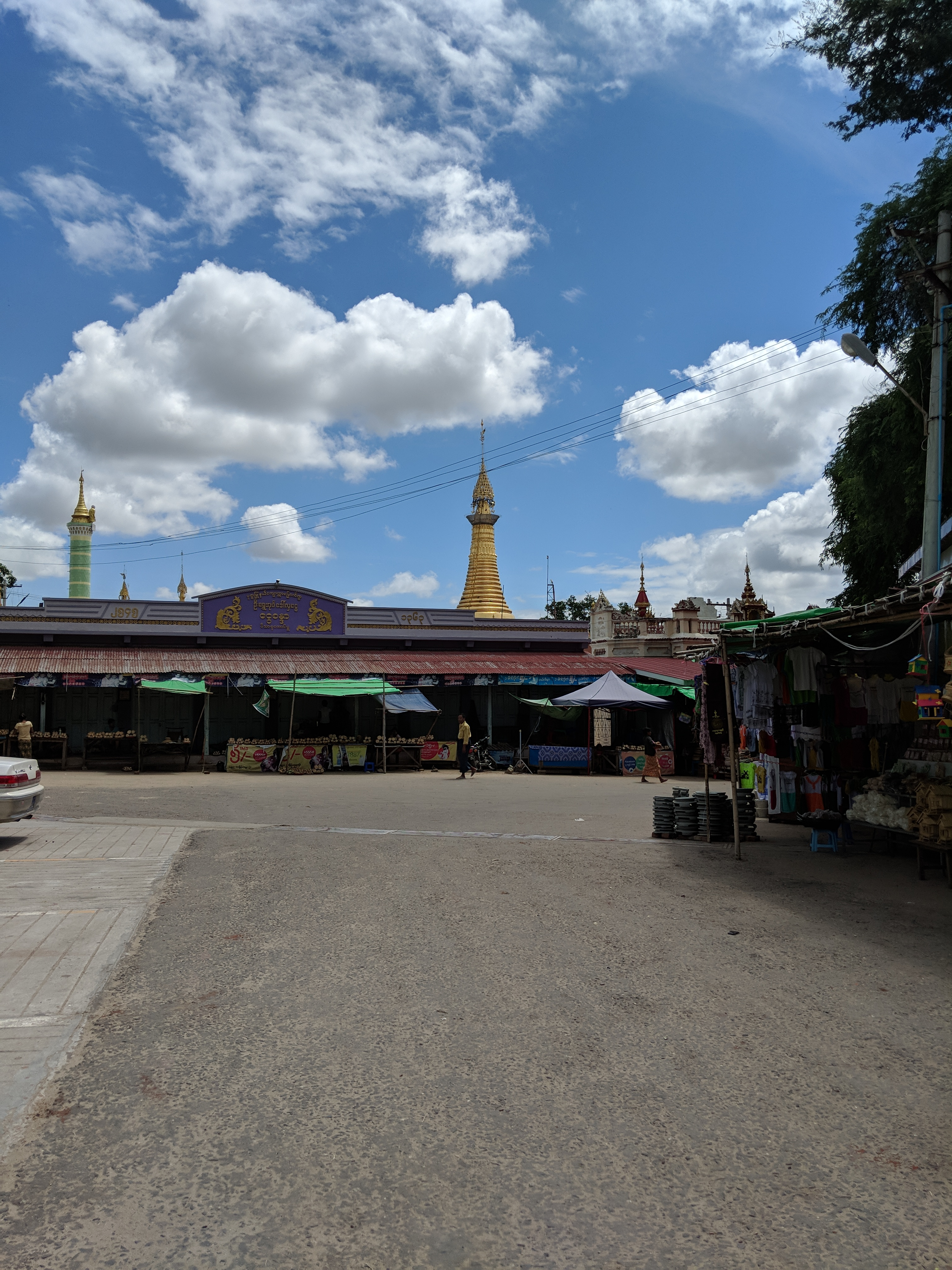 Kyaukka Golden Red Cave Pagoda, Monywa